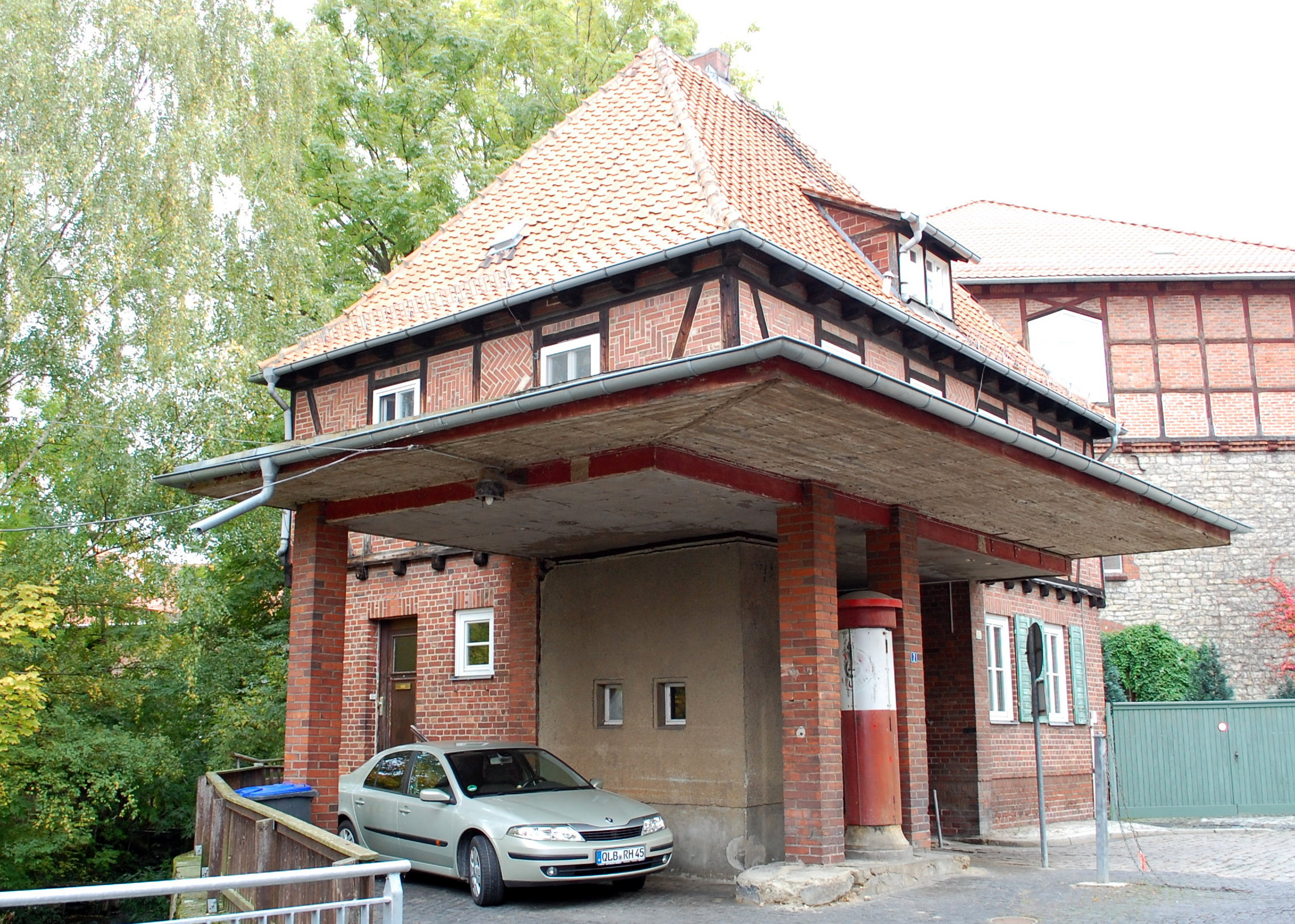 Haus Am Hospital 2 in Quedlinburg